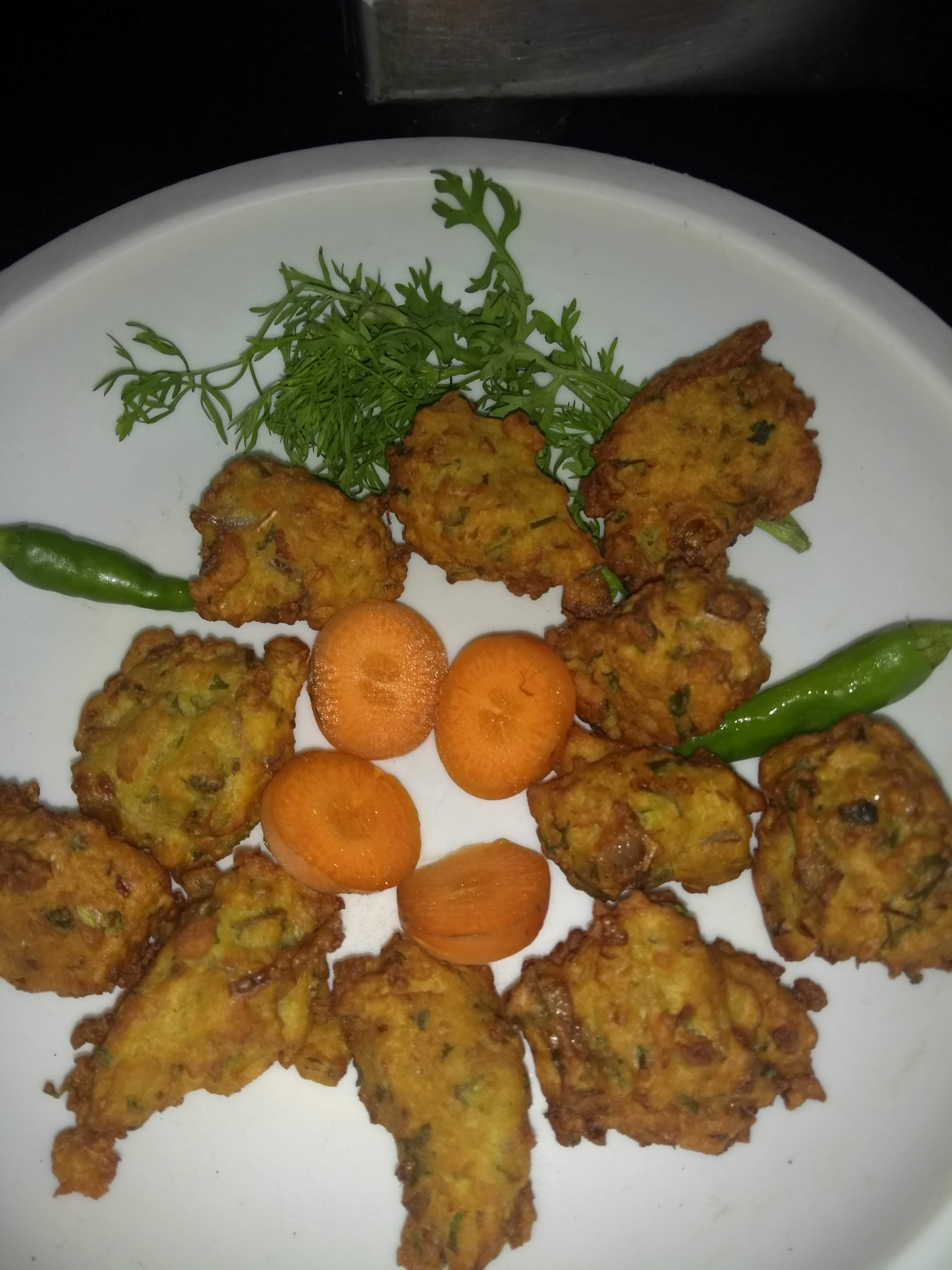 ಕನ್ನಡ: ನಮ್ಮ ಮನೆಯಲ್ಲಿ ಮಾಡಿದ ರವೆ ಬೋಂಡ